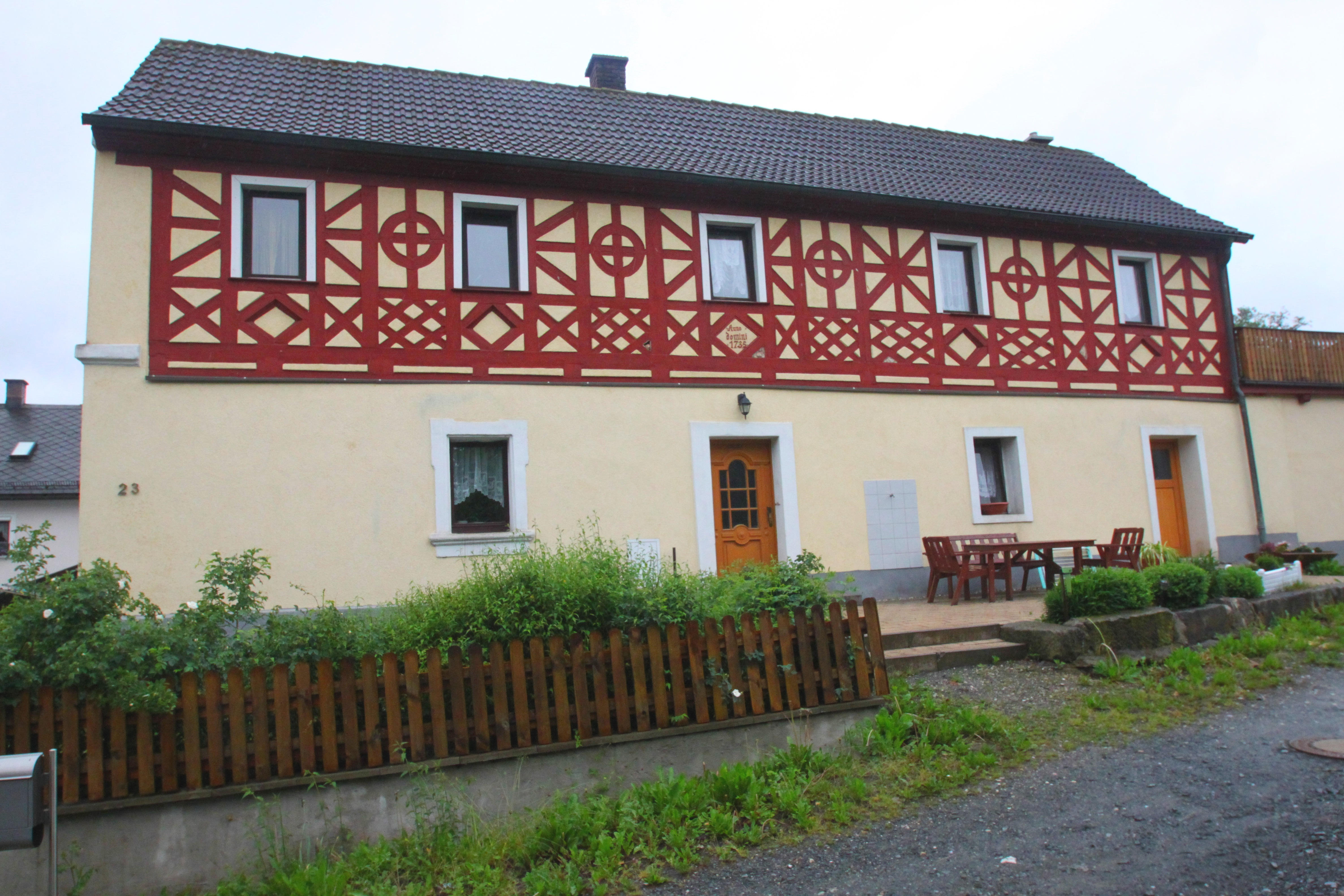 Bauernhaus, Kemnather Straße 23, Speichersdorf, Baudenkmal D-4-72-190-1